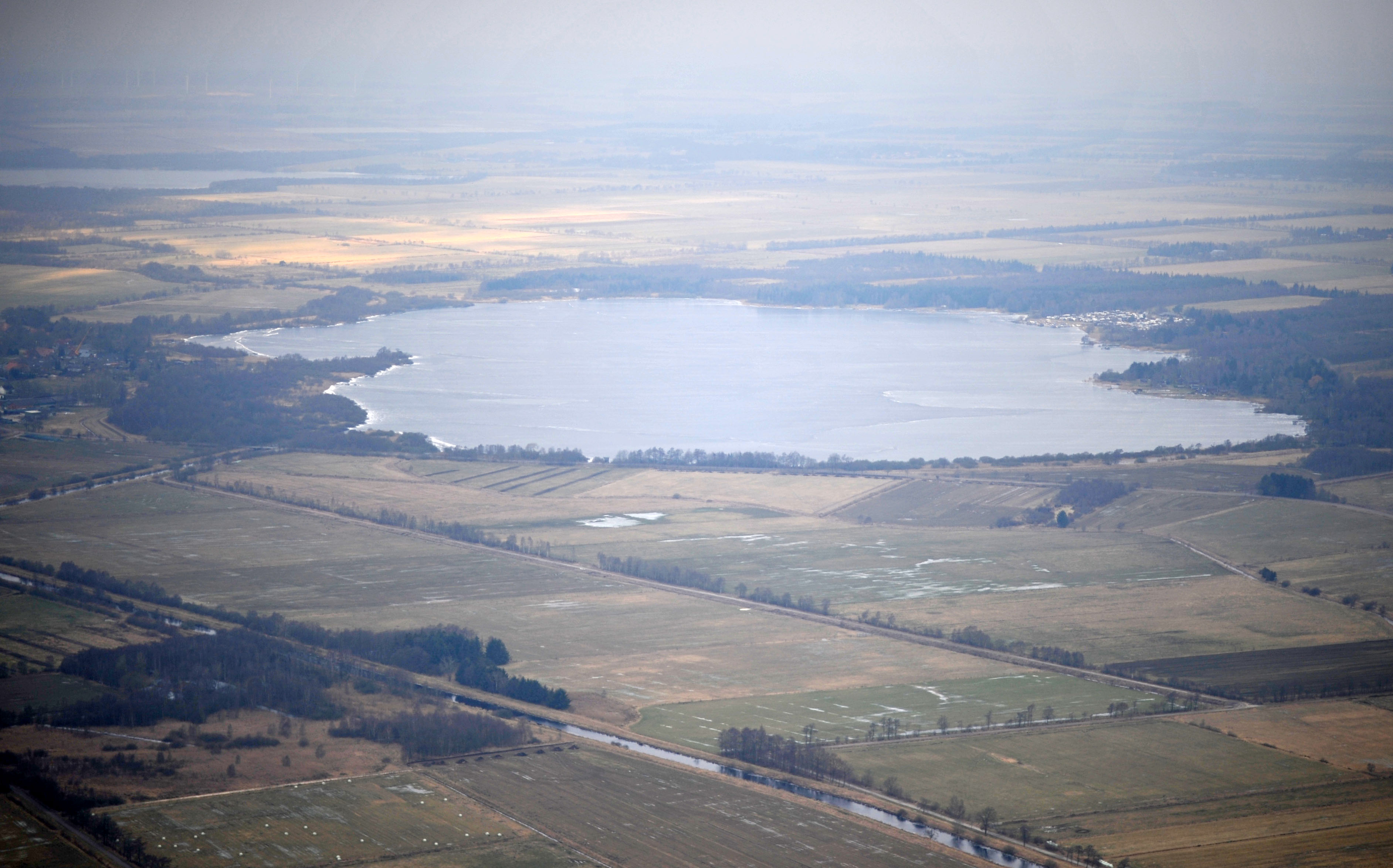 Fotoflugkurs Cuxhaven 2013: Flögelner See